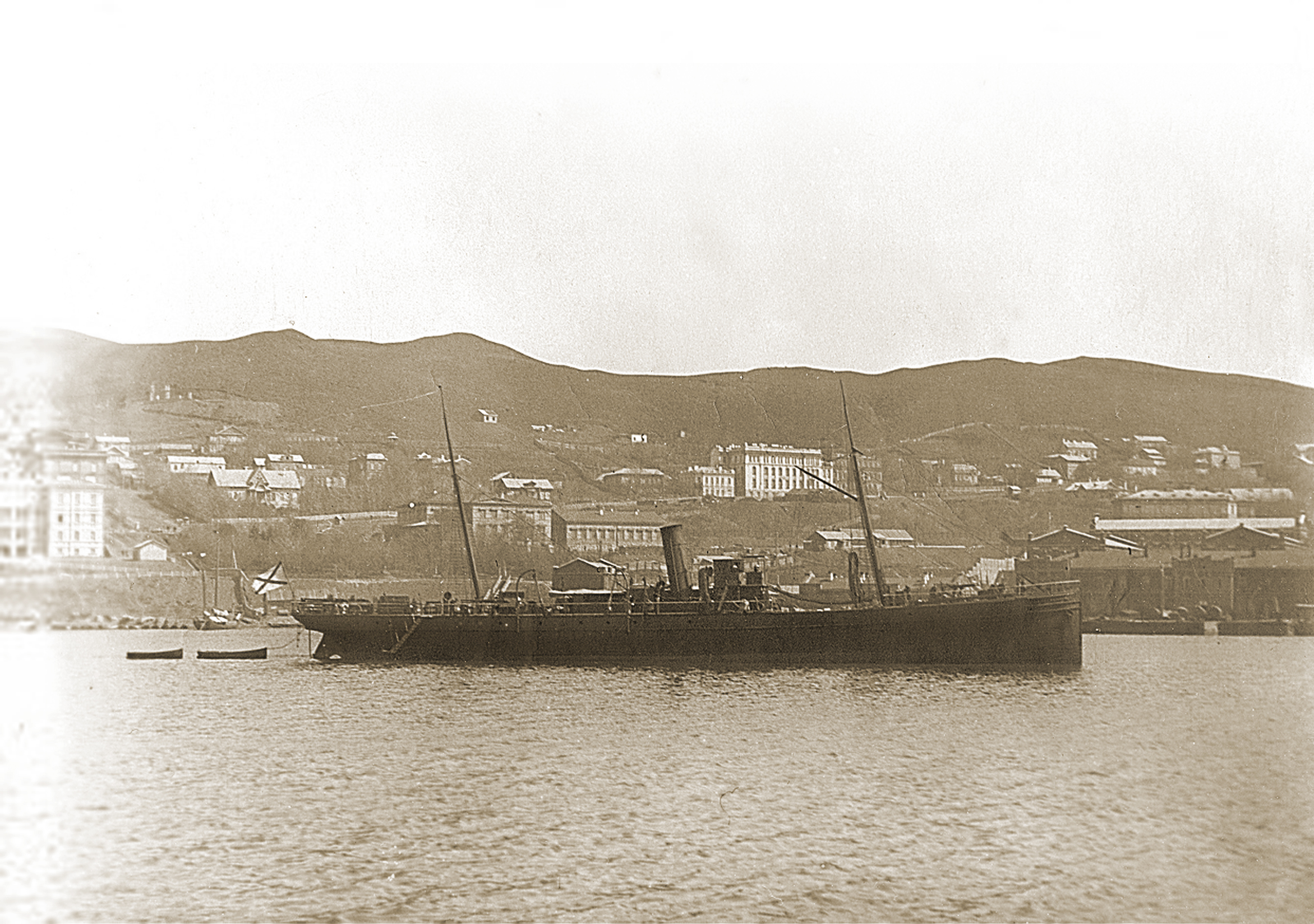 Военный транспорт Сибирской флотилии "Якут" во Владивостоке